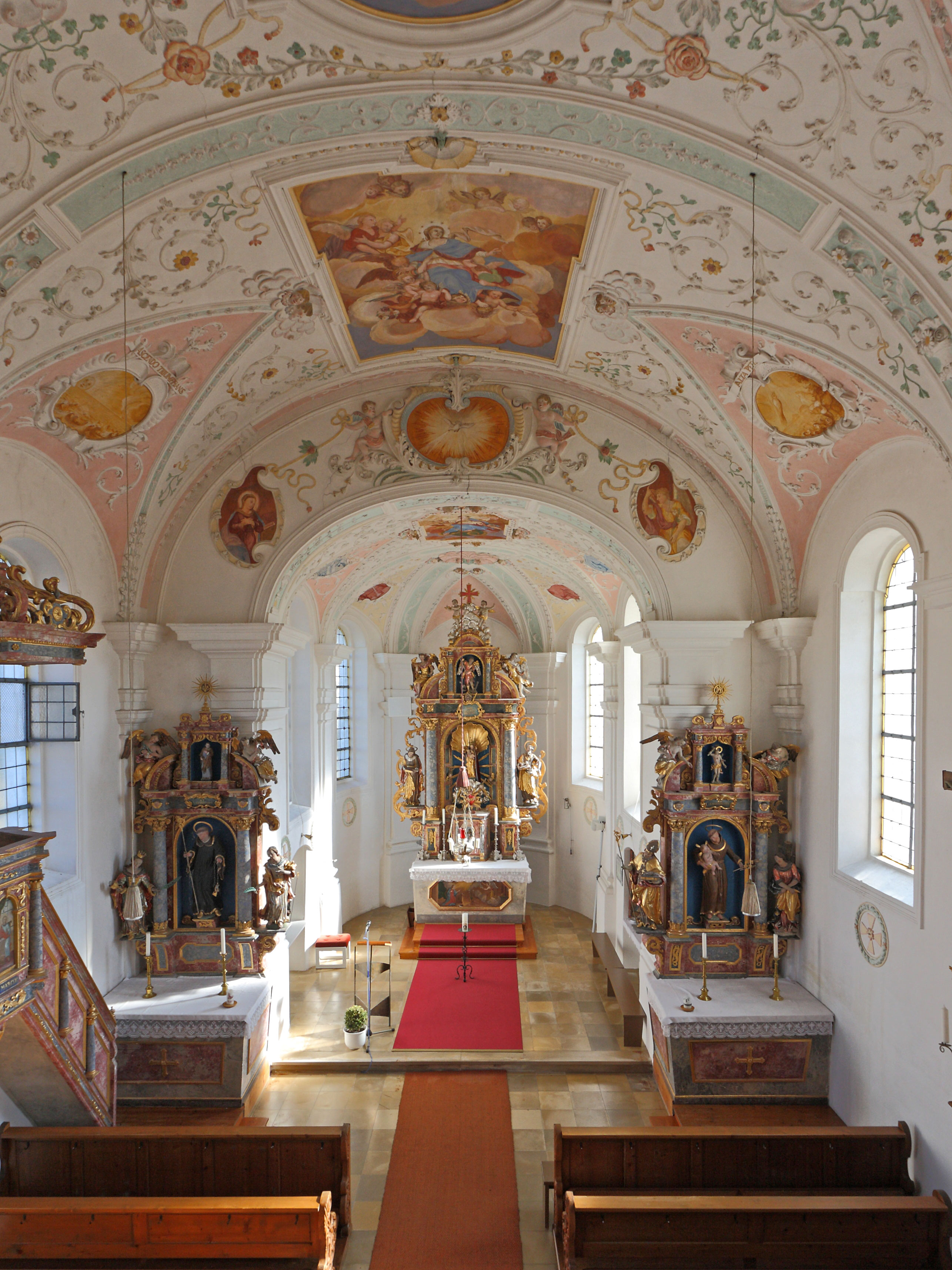 Kath. Filialkirche St. Maria in Neuhäder, Gemeinde Dinkelscherben; Ansicht von der Empore